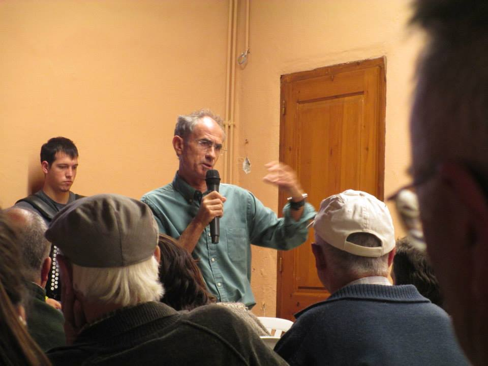 Pep Coll presentant a Coll de Nargó la seva obra; Dos taüts negres i dos de blancs